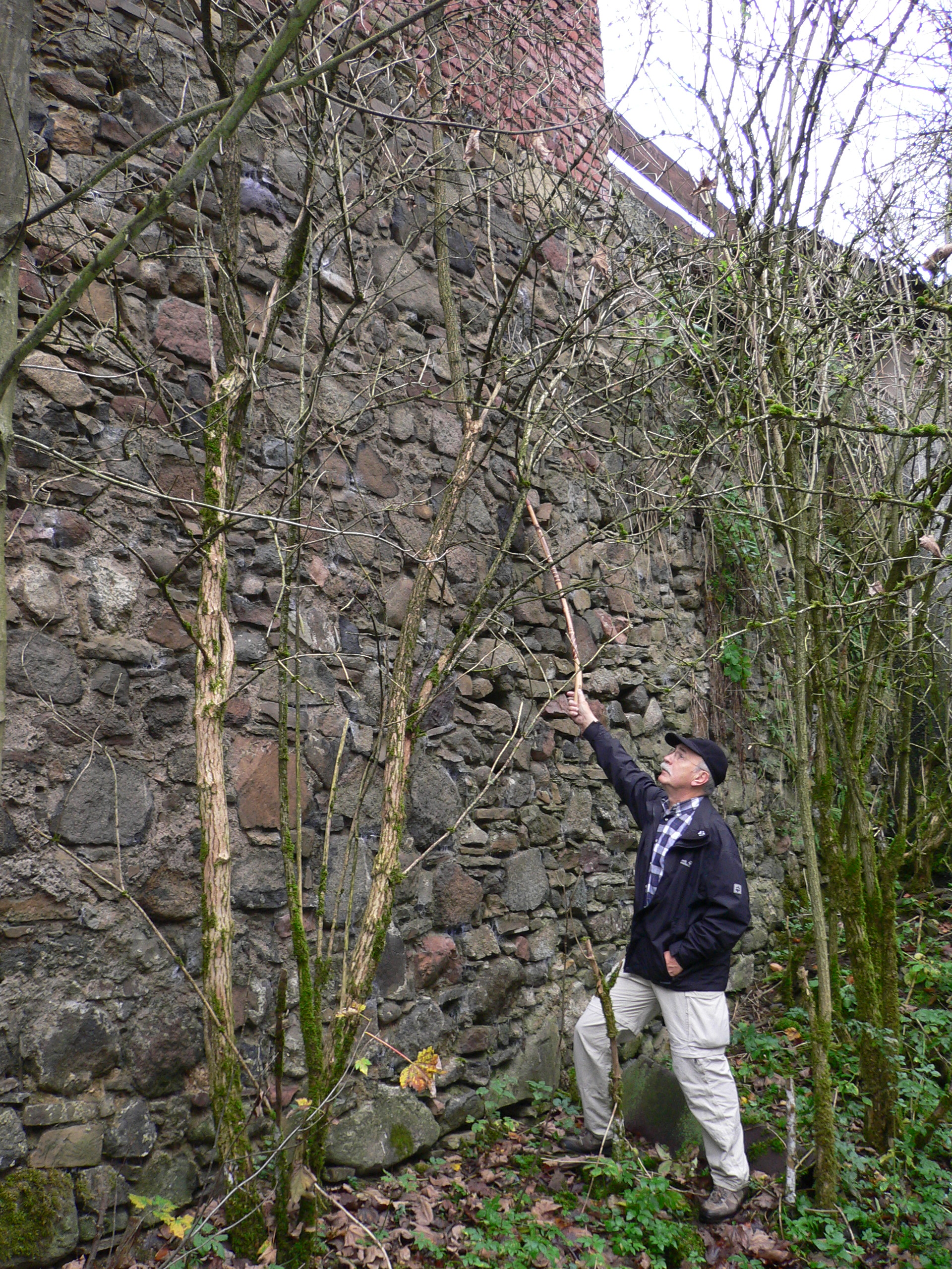 Dernbach Burgmauer